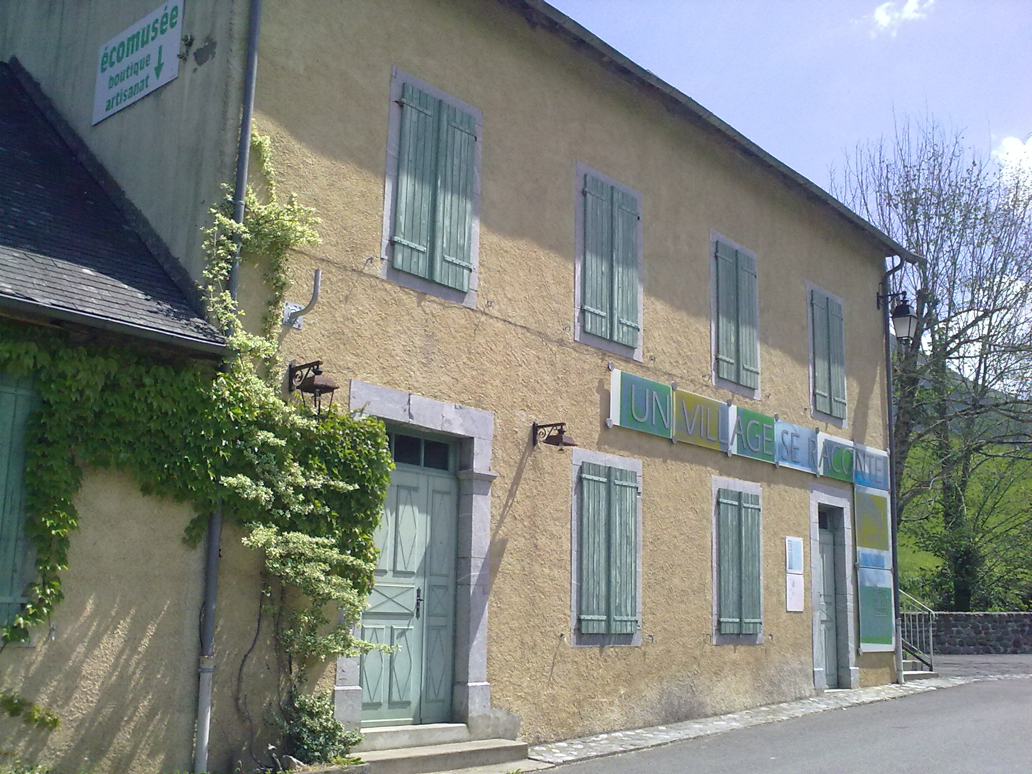 Lourdios-Ichère, France, le 23 mai 2010.